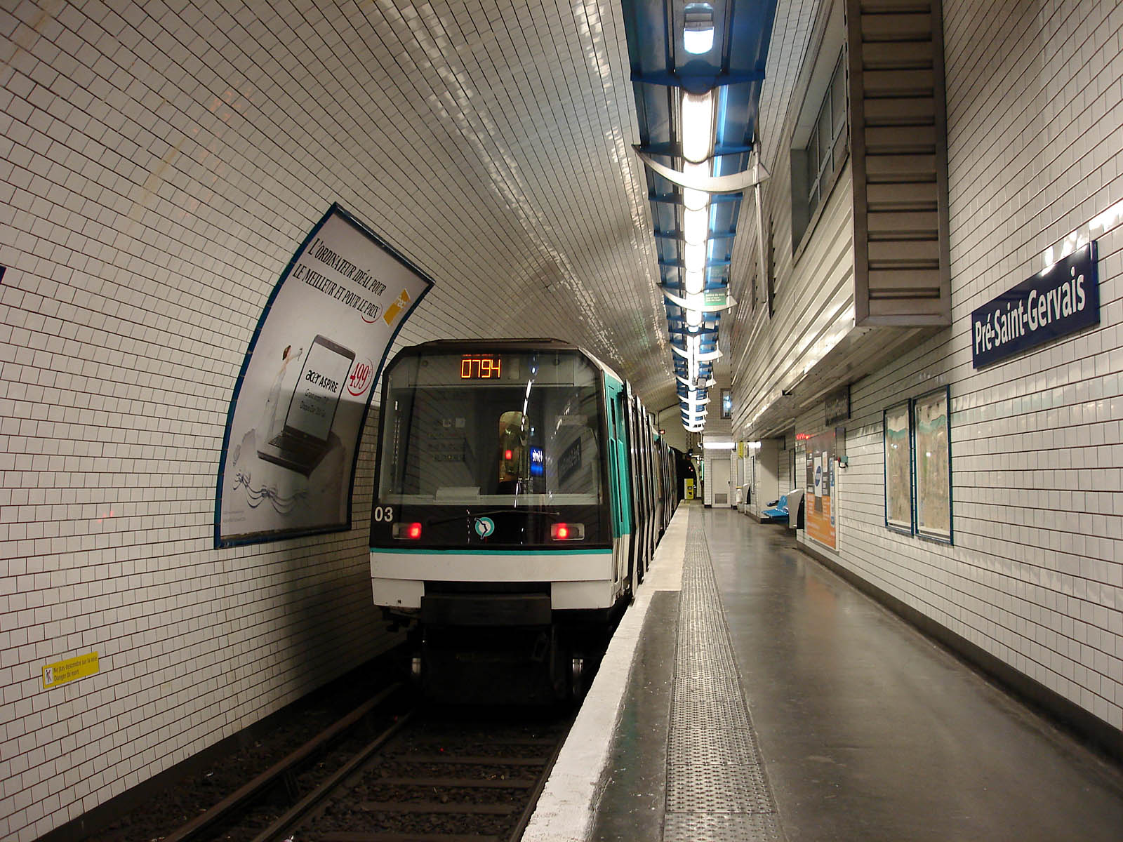 Station Pré-Saint-Gervais de la ligne 7 bis du métro de Paris, France.